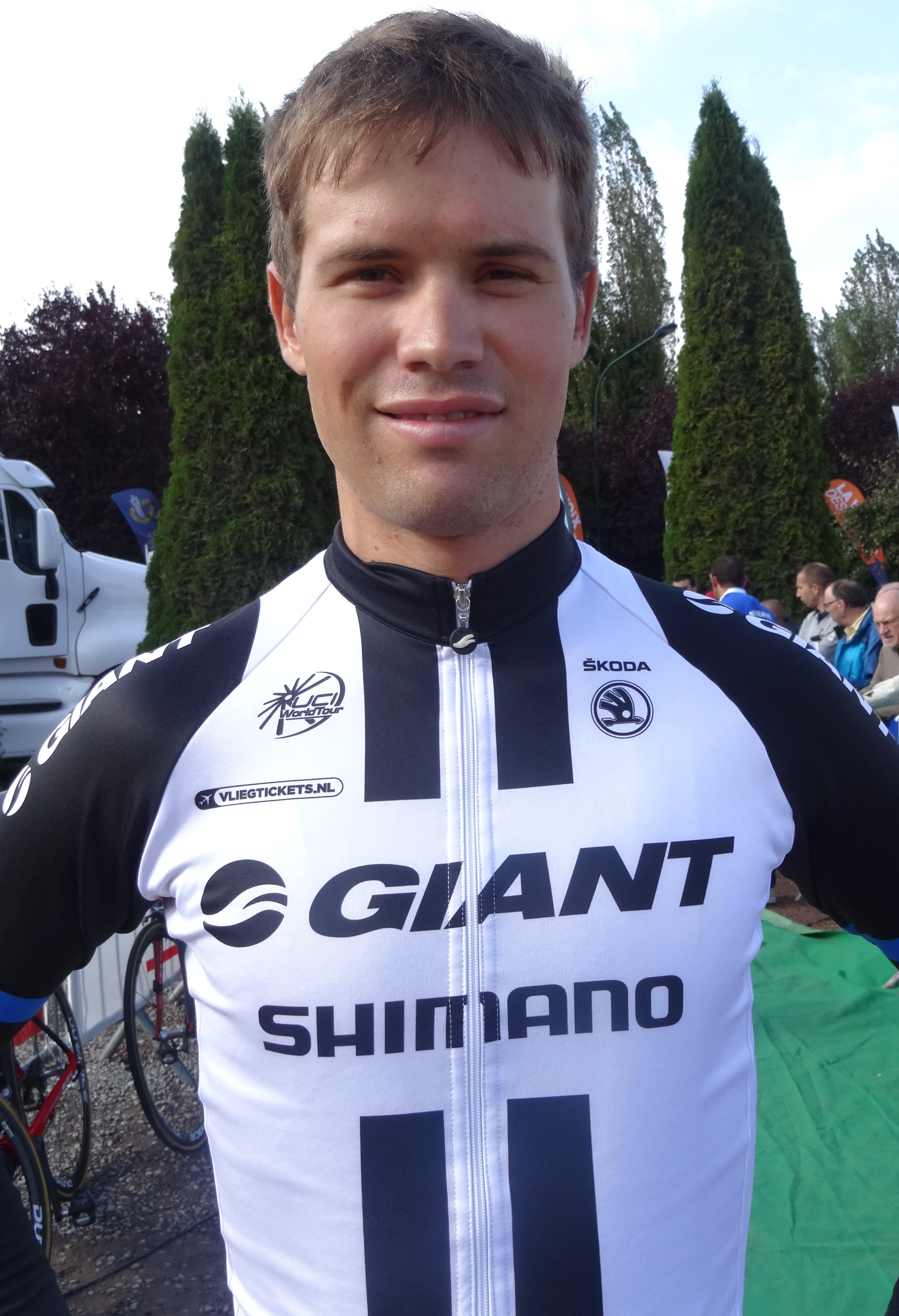 Reportage réalisé le dimanche 21 septembre à l'occasion du départ et de l'arrivée du Grand Prix d'Isbergues 2014 à Isbergues, Nord-Pas-de-Calais, France.